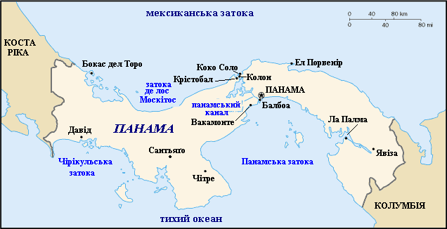 Mapa Panamy v ukrajinštině